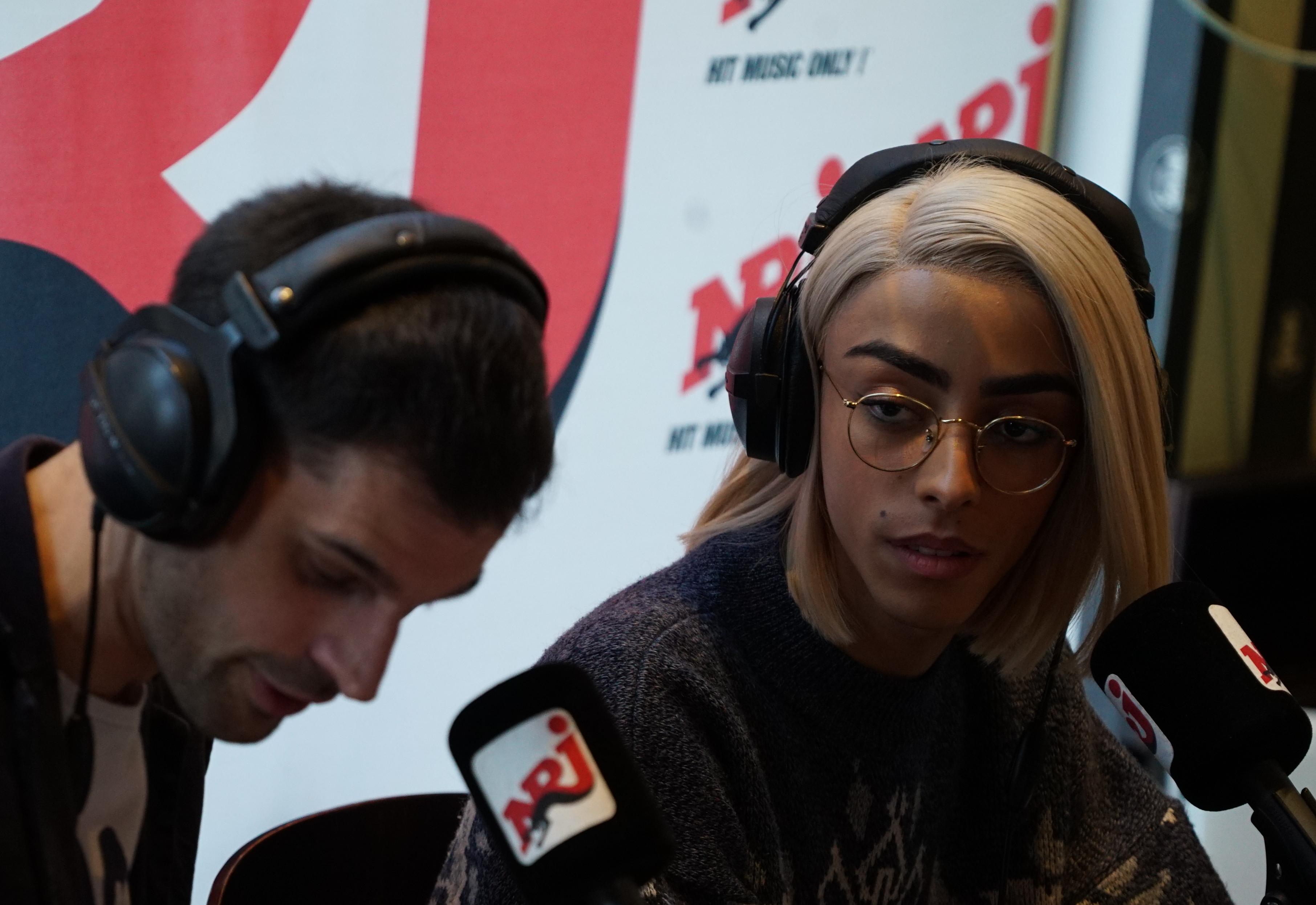 venue à Reims pour des dédicaces photographiques et un direct.